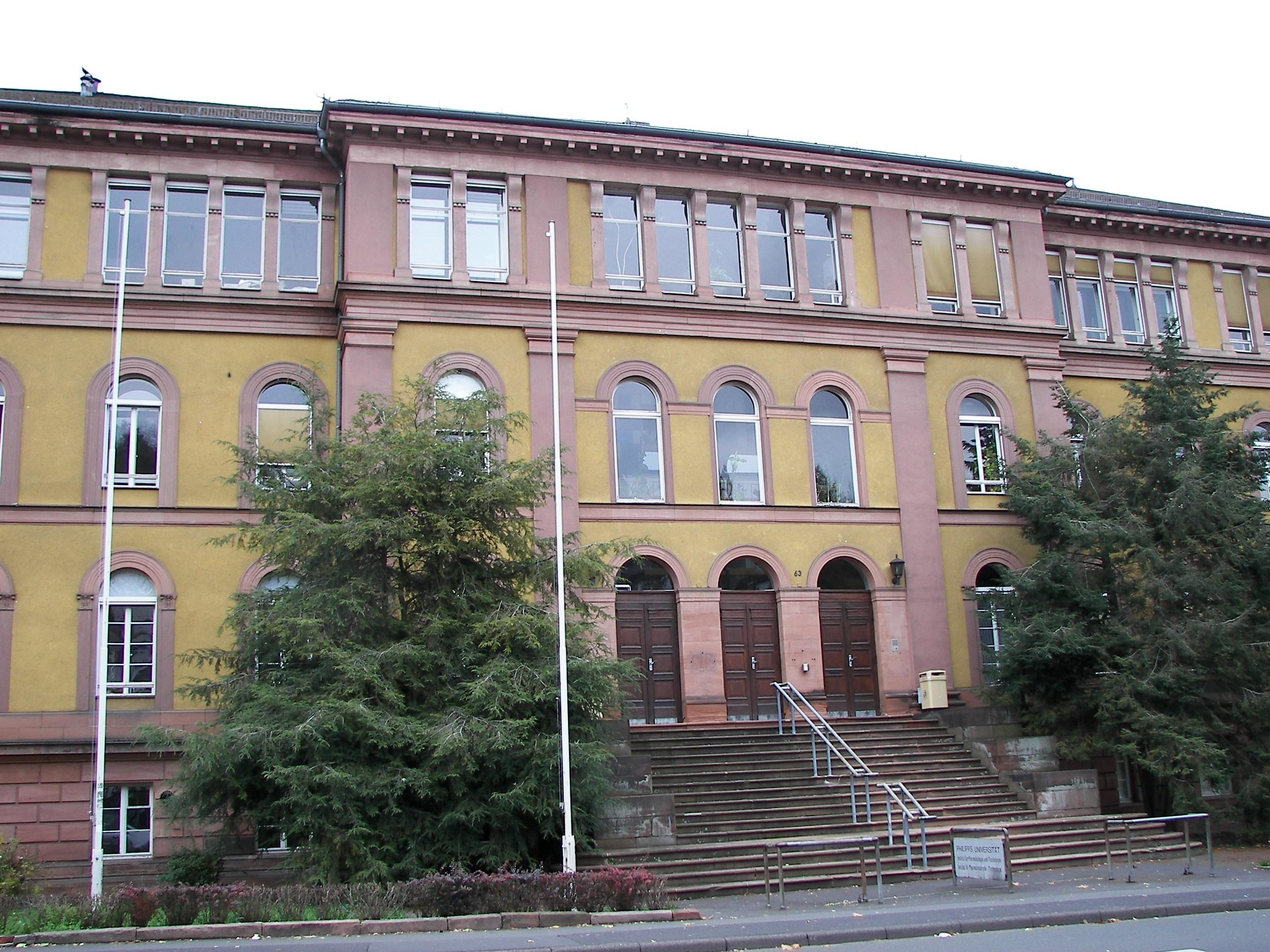 Uni Marburg, Fachbereich Pharmazie in der Ketzerbach